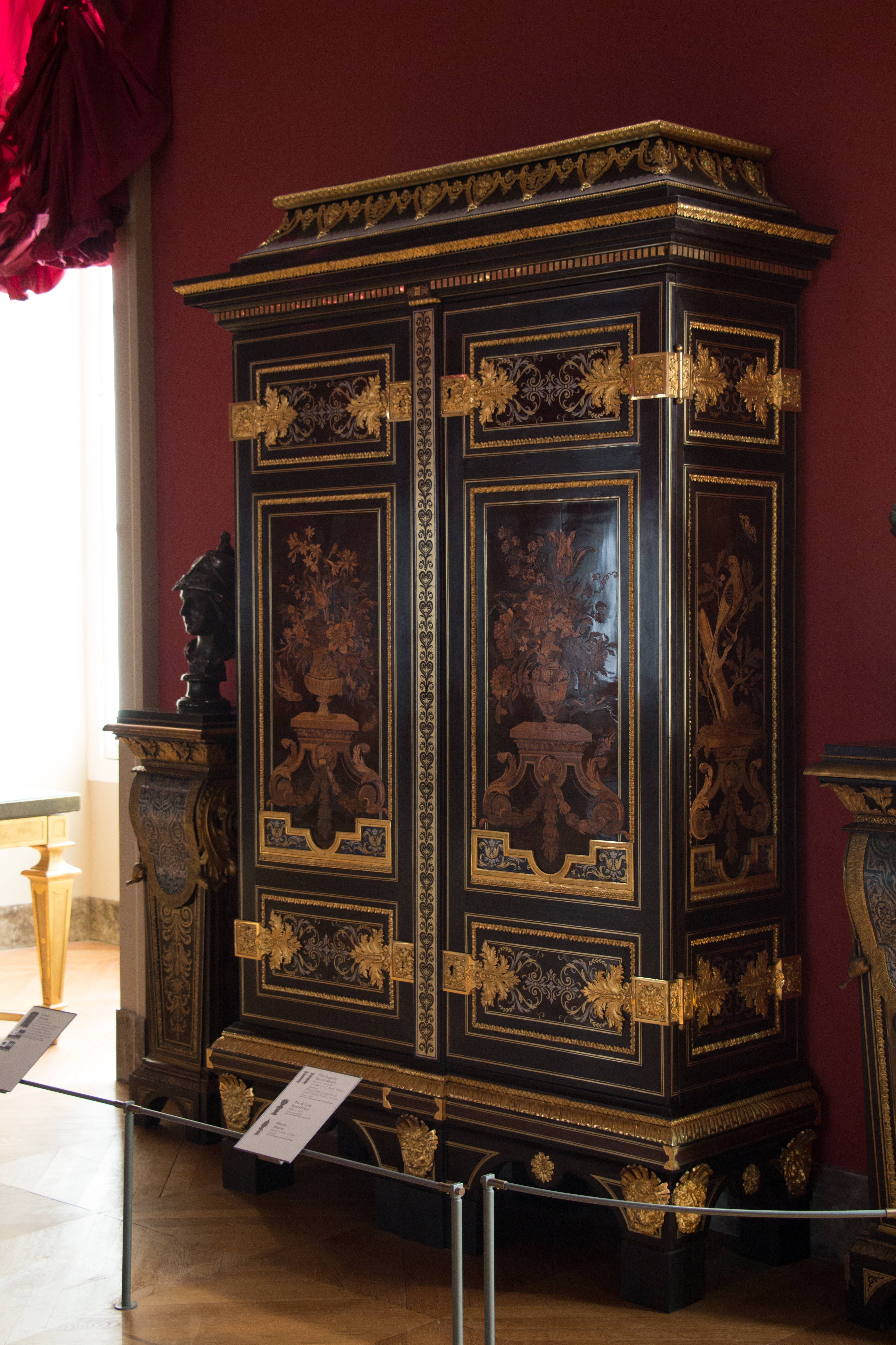 Armoire réalisée par Boulle entre 1680-1700 et conservée au musée du Louvre